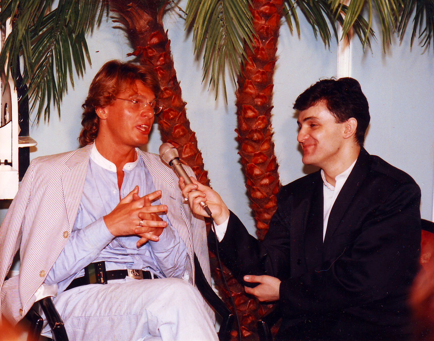 Евгений Додолев дает интервью Андрею Вульфу